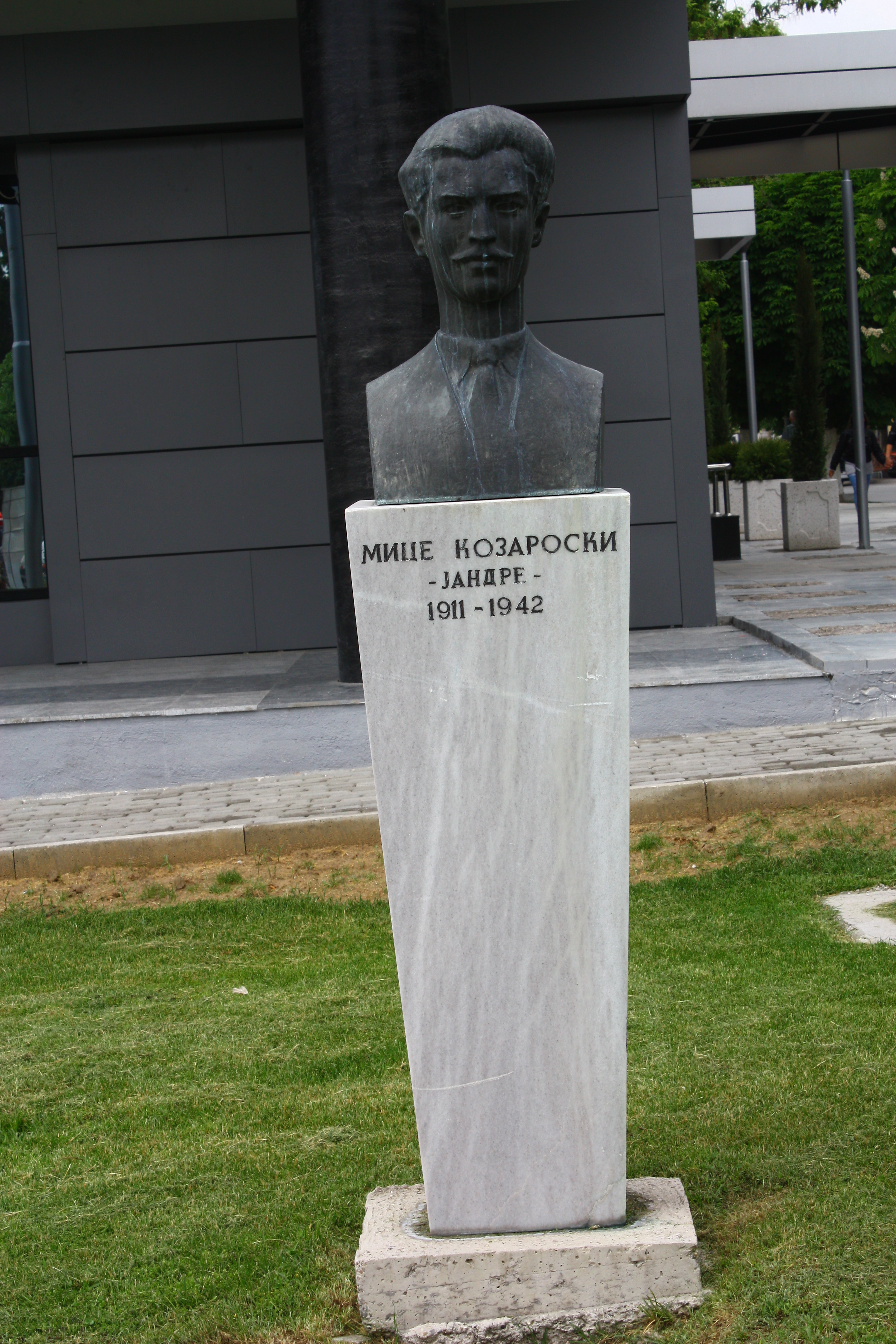 Мице Козароски - Јандре, партизан. Биста во Прилеп